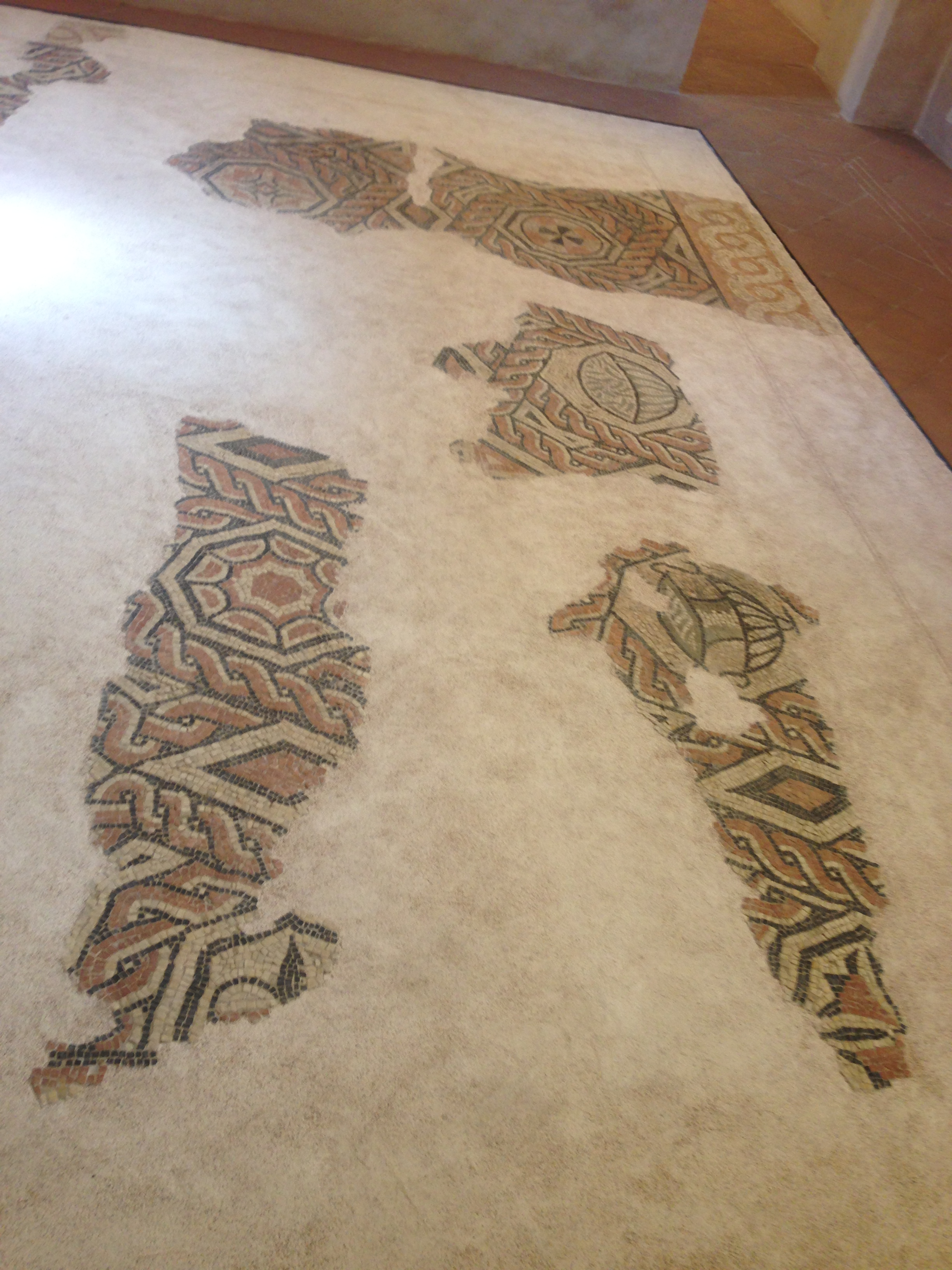 Mosaico pavimentale San Marco. Prima metà VI Secolo. Marmo e pietra policromi